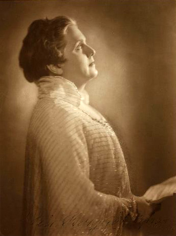 Bildet er hentet fra Nasjonalbibliotekets bildesamling Depicted person: Ibsen, Bergliot